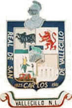 Stemma di Vallecillo (Nuevo León)